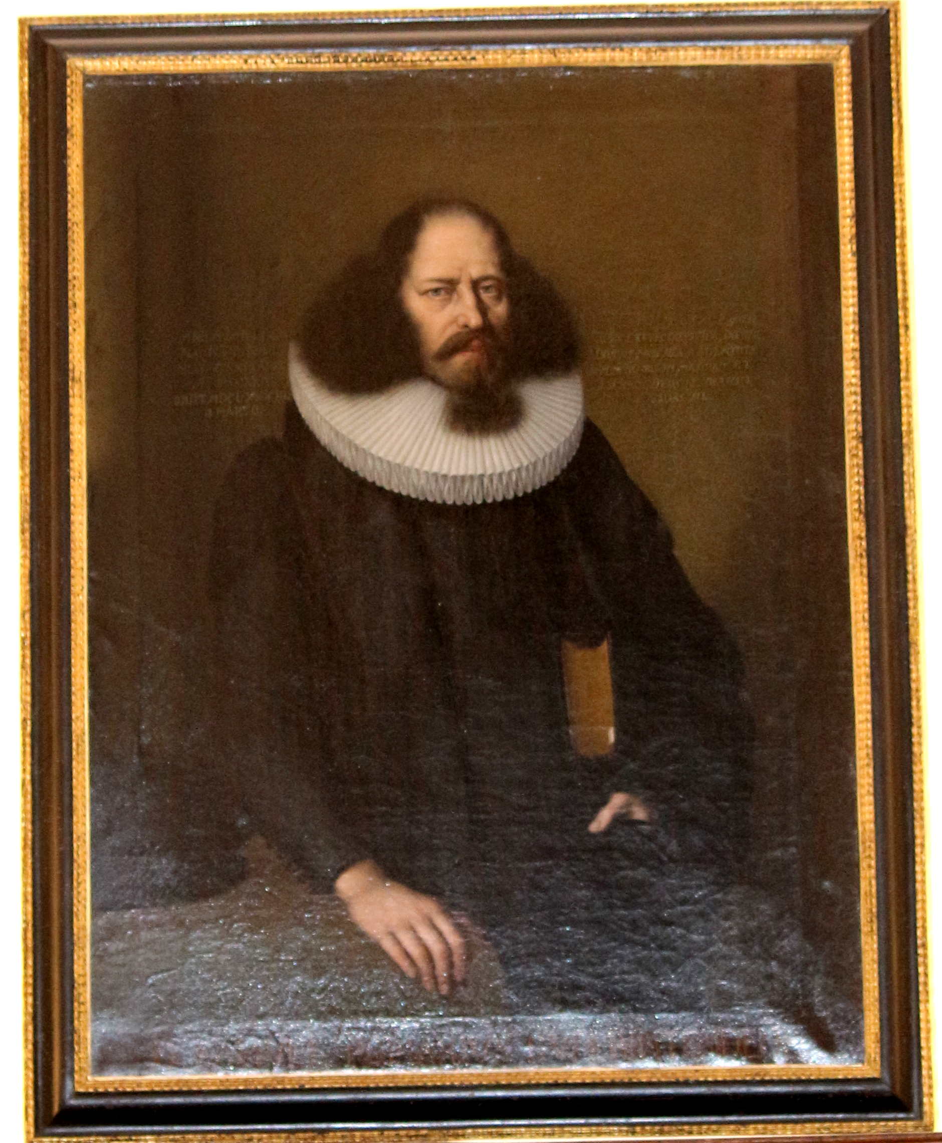 Samuel Pomarius - Gemälde in der Stadtbibliothek Lübeck